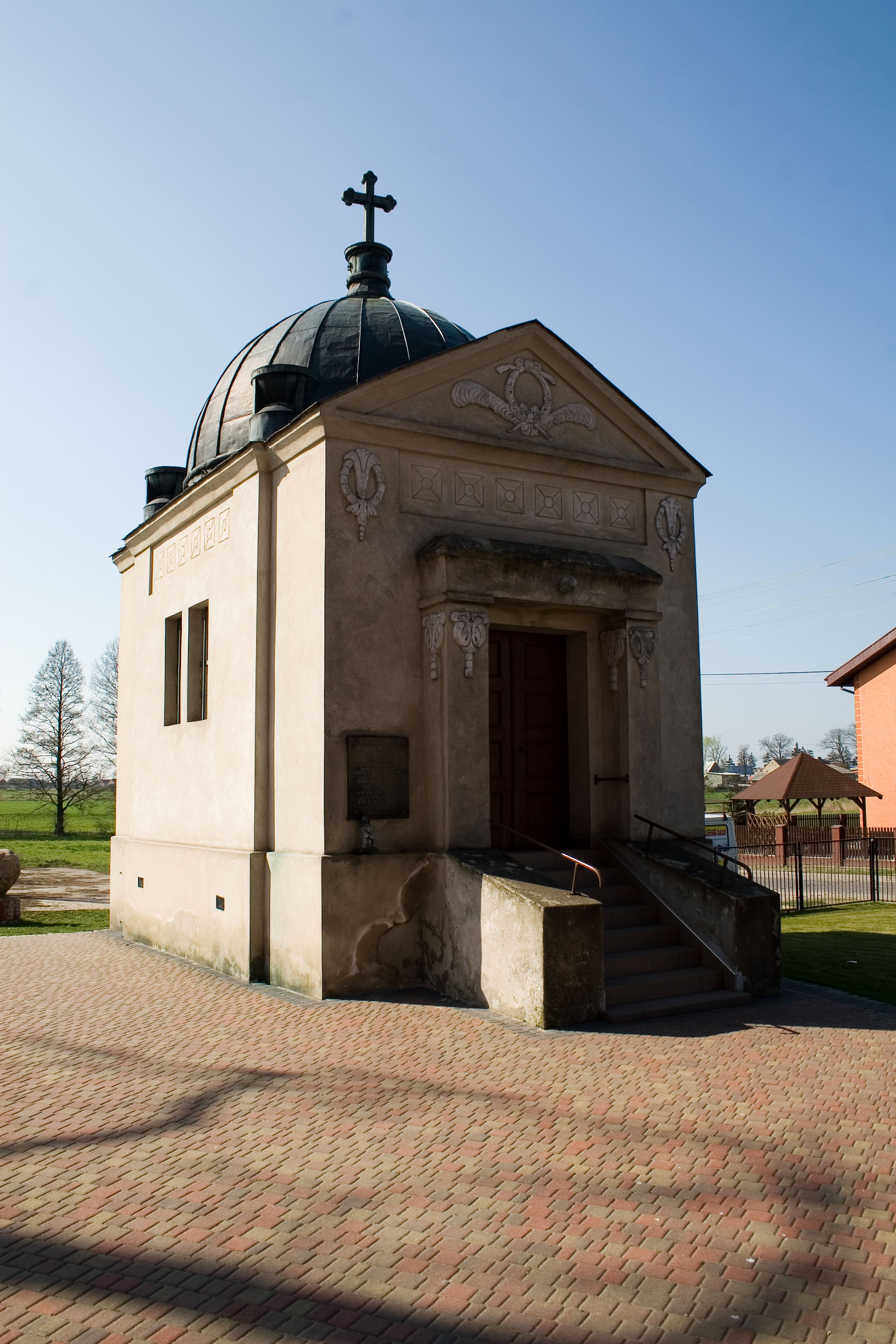 Grobowiec rodu Thiel w Doruchowie.